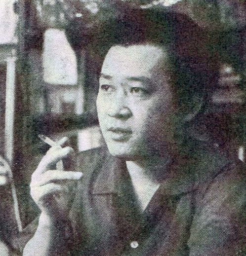 主婦と生活社『主婦と生活』第21巻第10号（1965）より川村晃